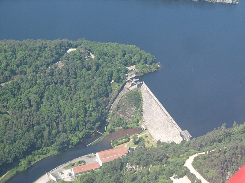 Photographie aérienne du barrage de Guerlédan / Guerlédan dam (France), airborne photograph